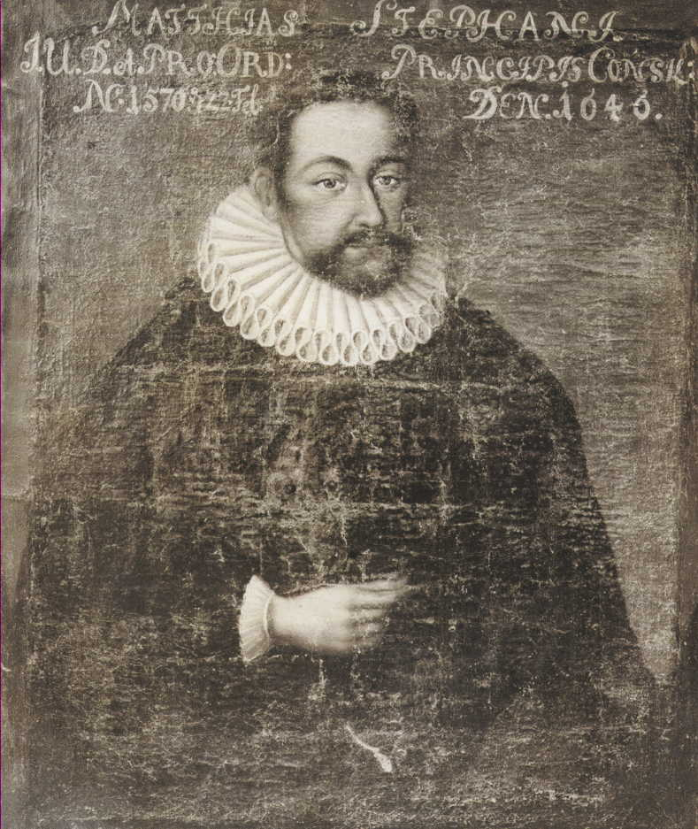 Bild des Greifswalder Juraprofessors Matthias Stephani (1570–1646)